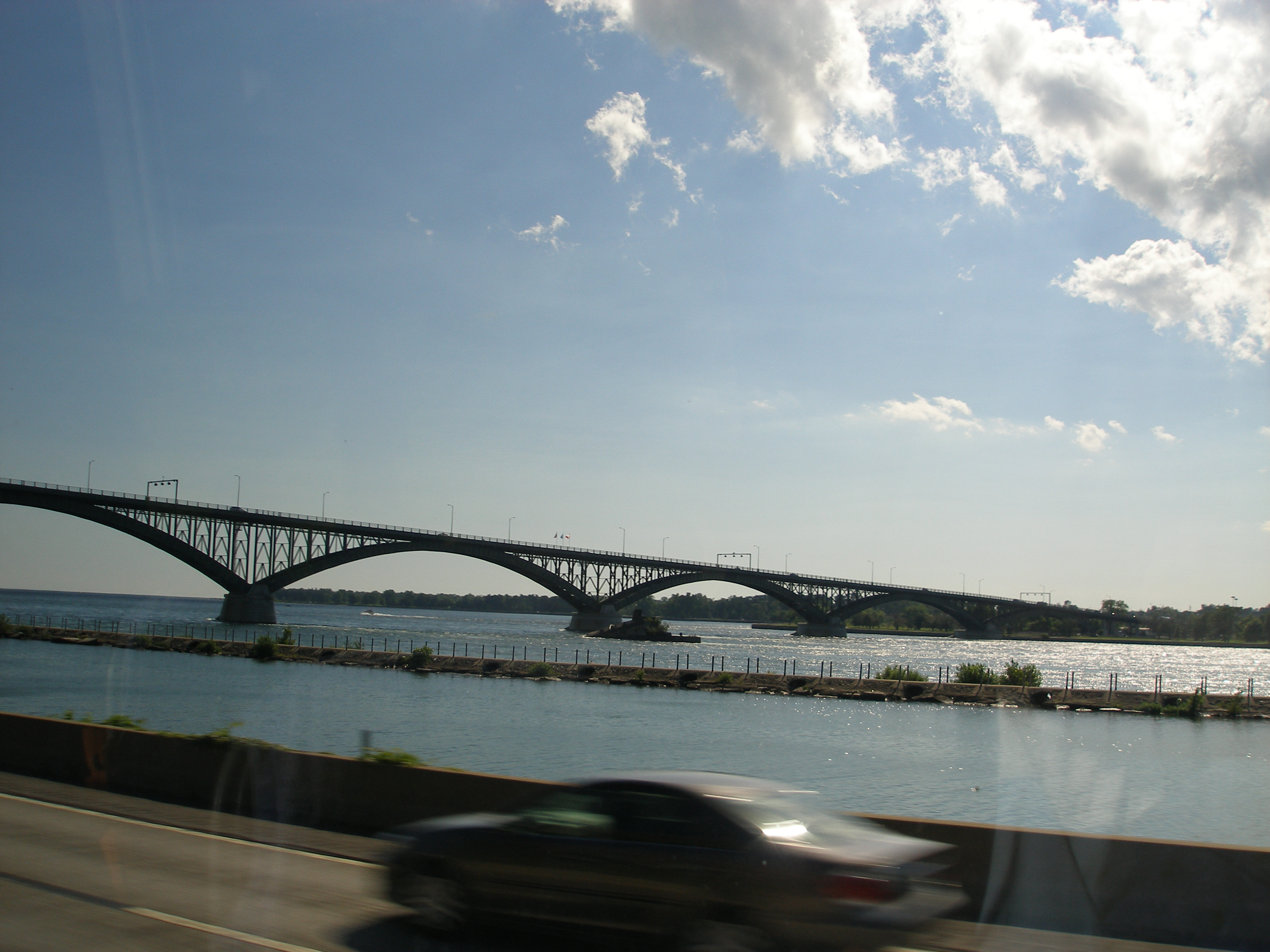 Początek rzeki Niagara pod tym mostem.